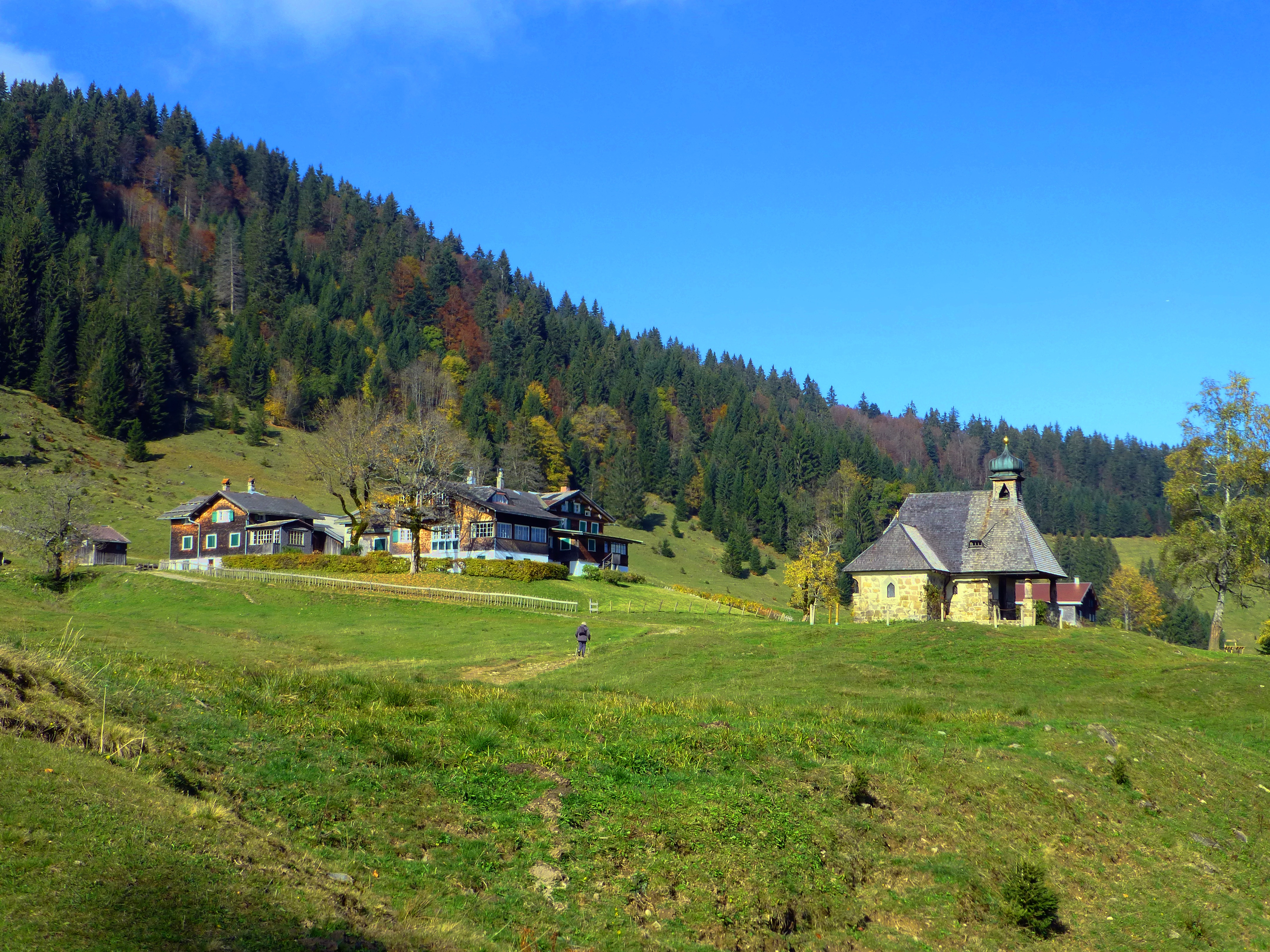 Blick von Südosten auf die Alphütte der Hochälpele-Alpe und die Benediktkapelle